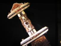 Svärdfäste från Valsgärde gravfält